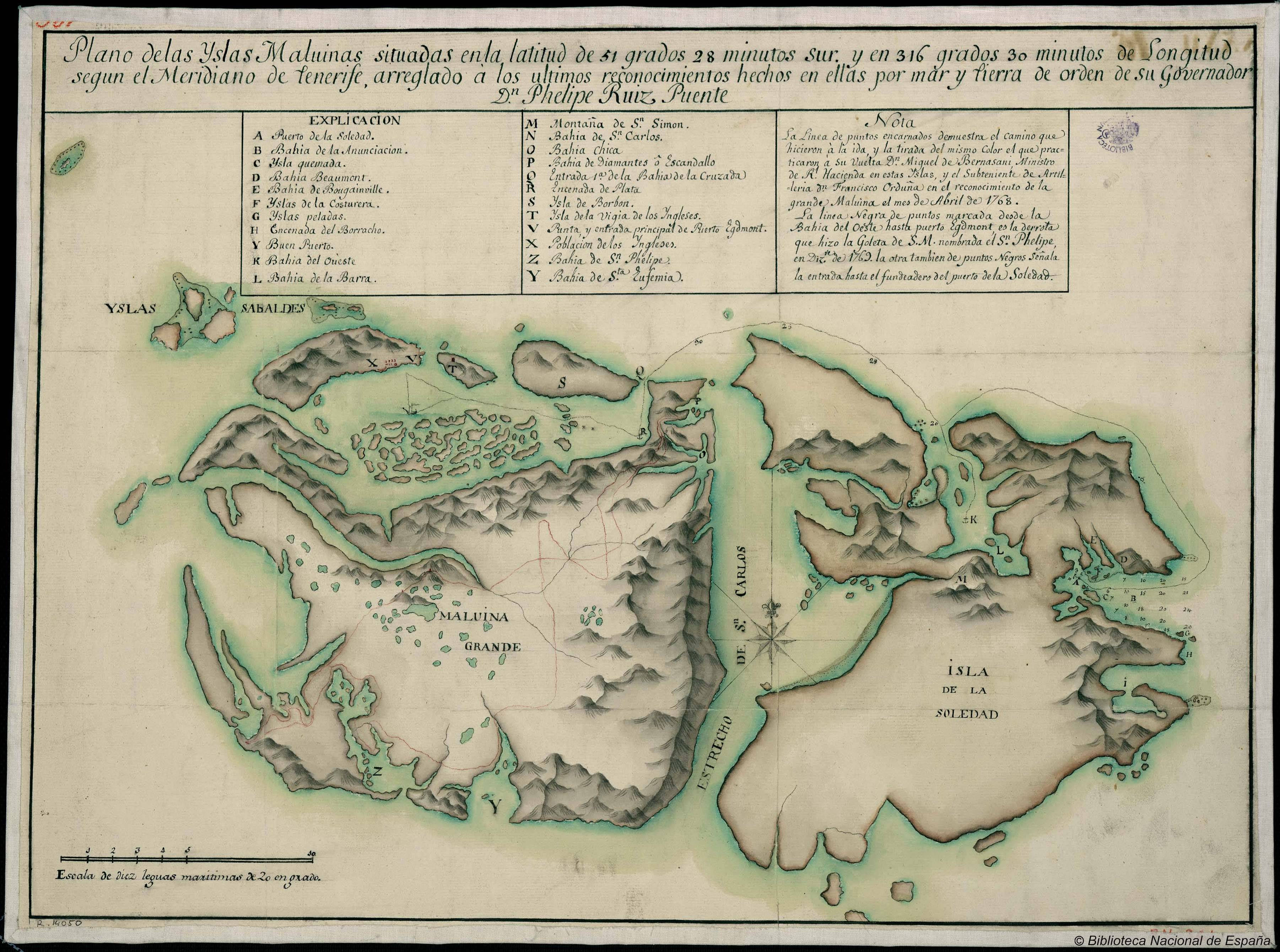 Mapa de las islas Malvinas cuando Felipe Ruiz Puente ejercía como el primer gobernador español de las islas (1767-1773), como parte del Virreinato del Río de la Plata.